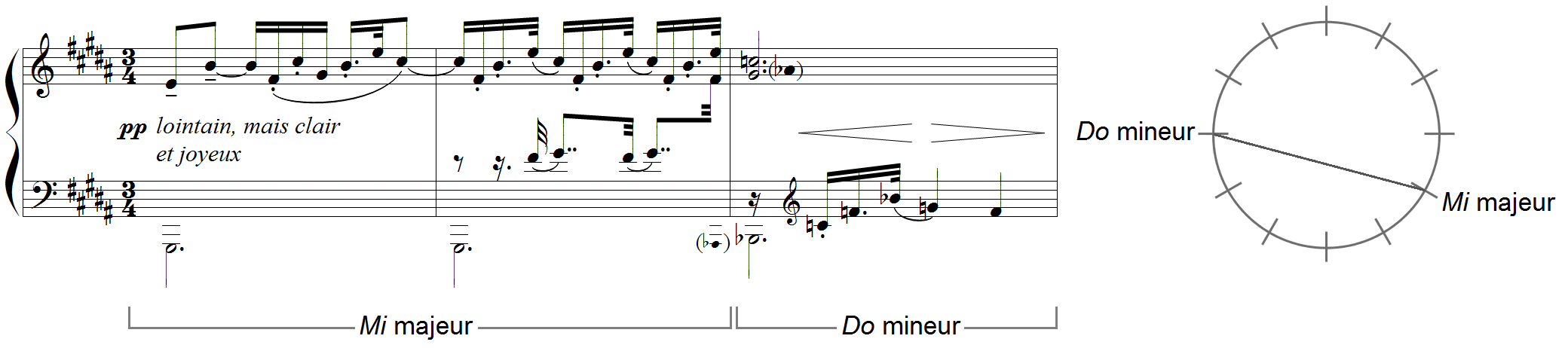 Debussy - Etude "pour les sonorités opposées", mes.31-33